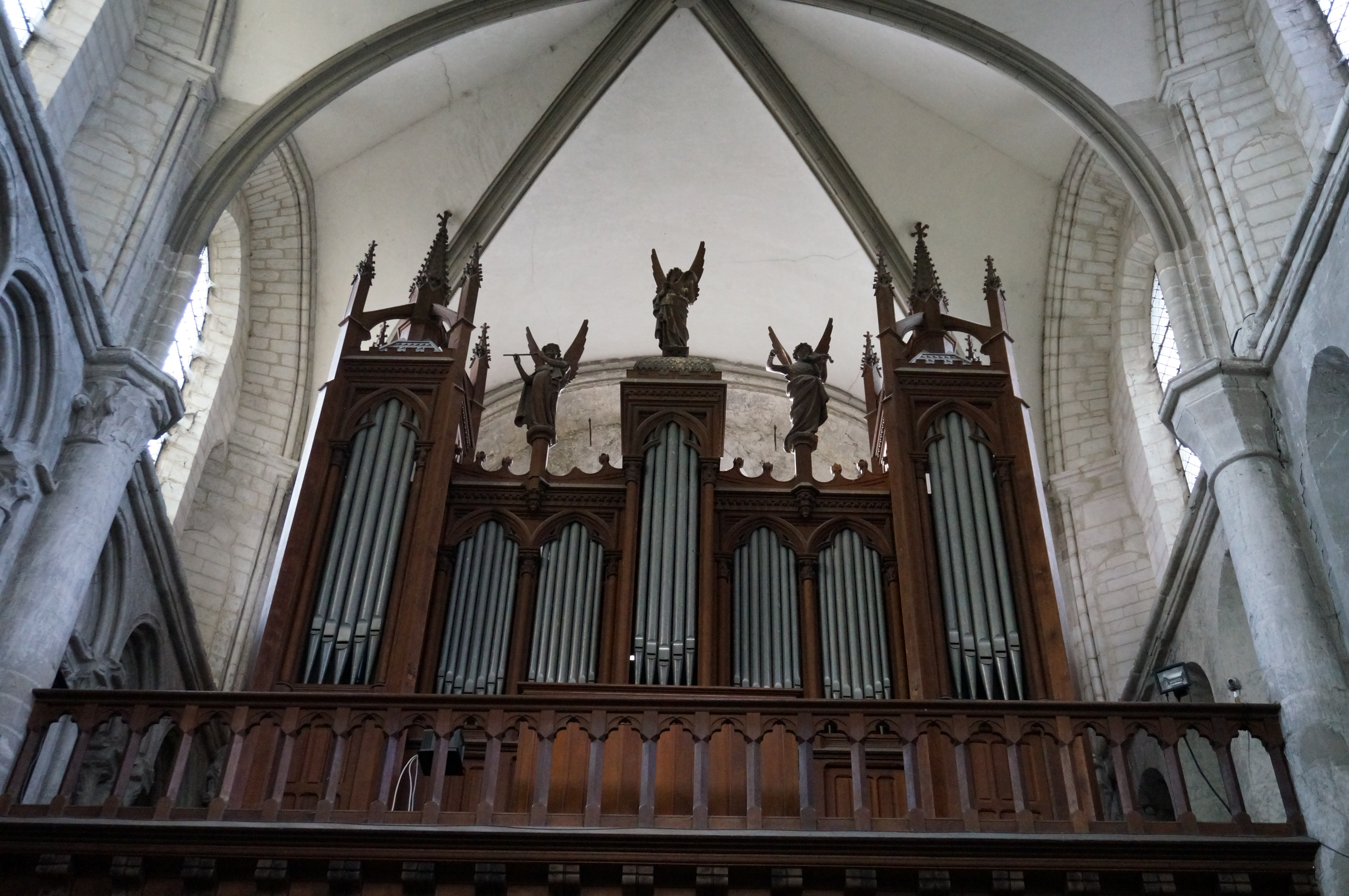 Troyes (Aube, France), église de la Madeleine, orgue de la tribune sud construit en 1901 par Charles & Frédéric Rollin.